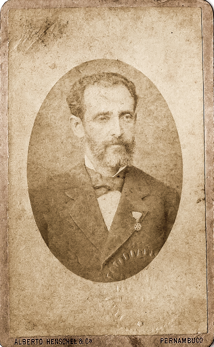 Lourenço Bezerra Alves da Silva, Barão de Caxangá.